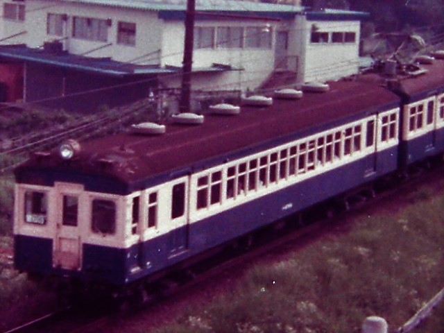 国鉄42系電車 クハ47104